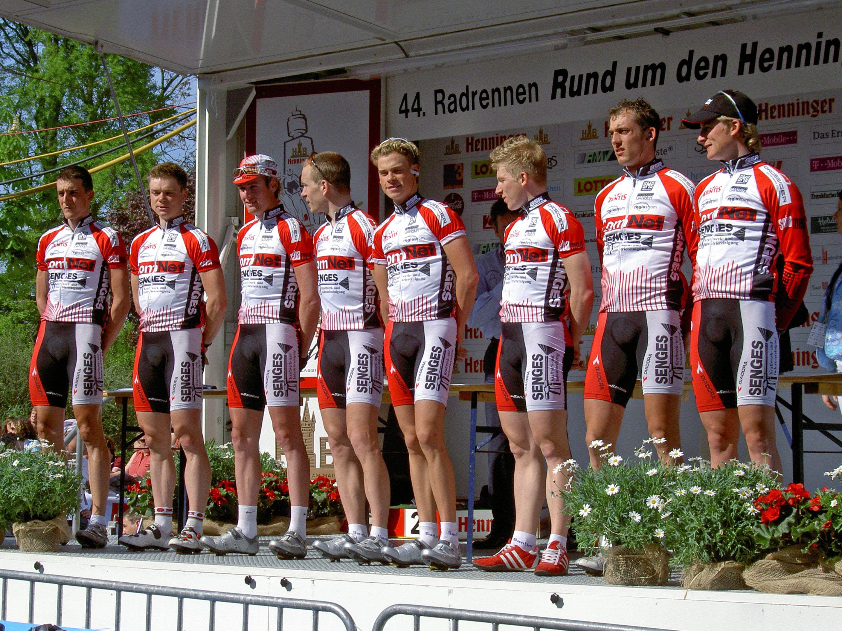 Germany Frankfurt am Main Rund um den Henninger-Turm COMNET SENGES